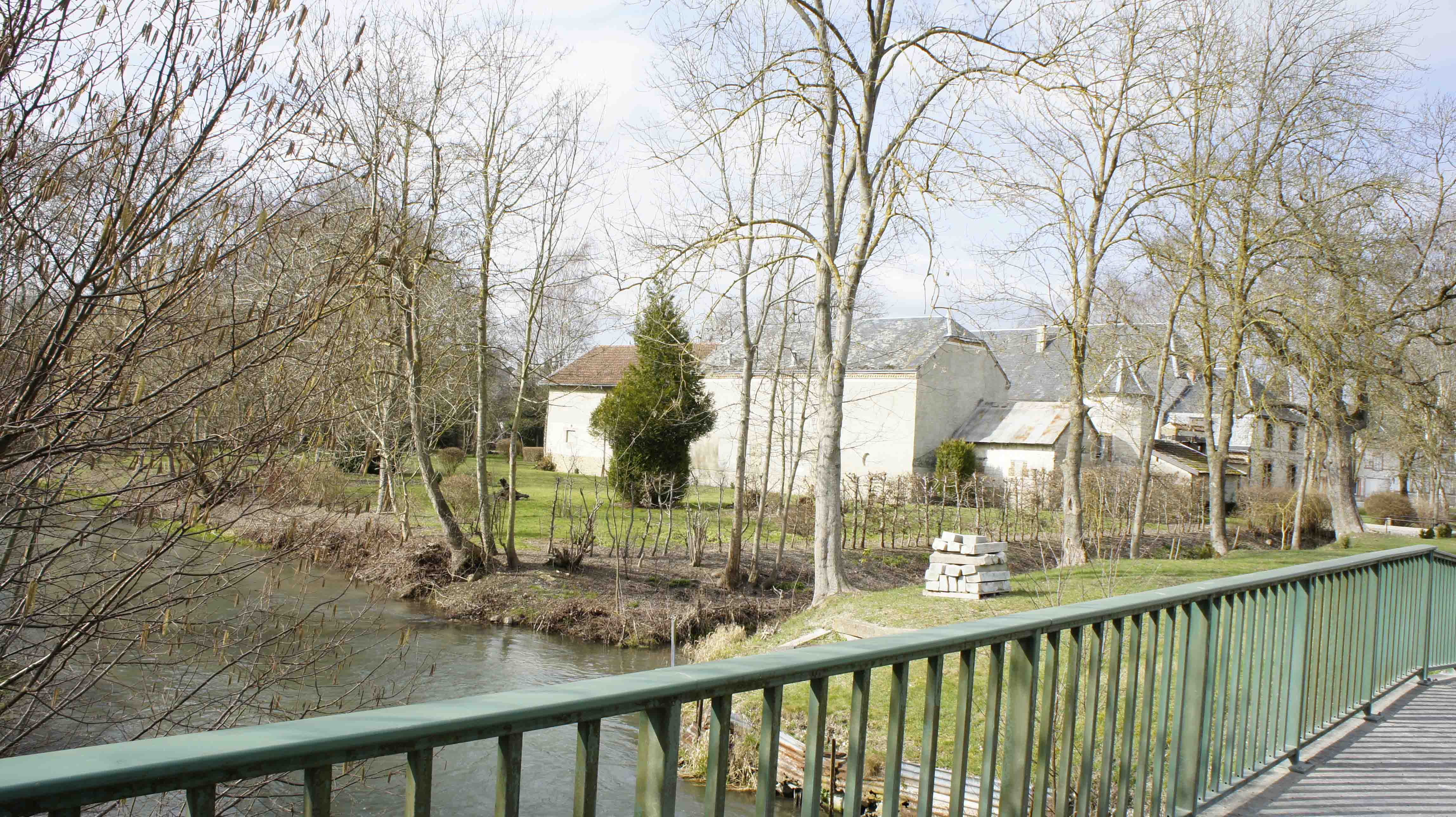 Le Retourne à Roizy. Sur la droite le château qui a encore son fossé noyée par le Retourne.